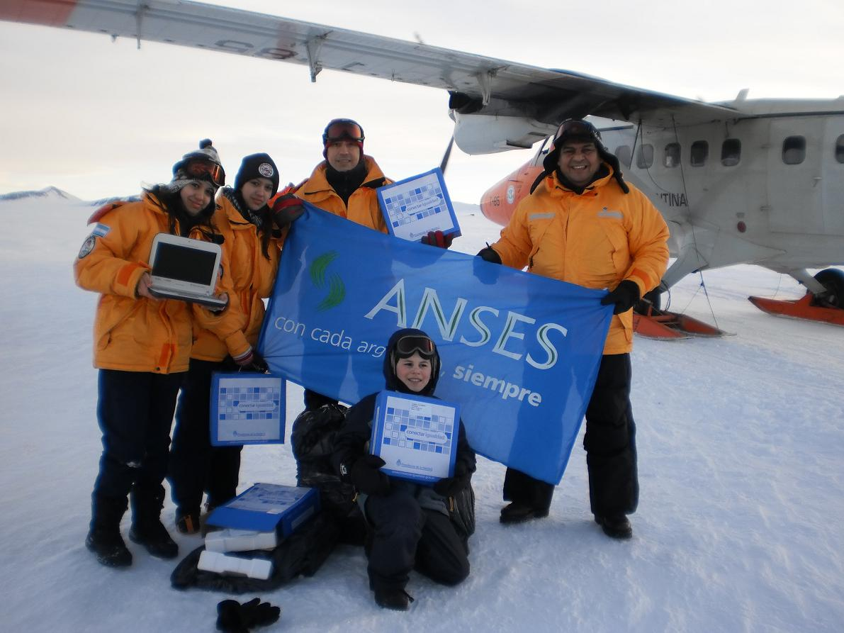 En el Día del Estudiante, alumnos y docentes de la Antártida Argentina recibieron por primera vez las netbooks de Conectar Igualdad. El responsable de una de las delegaciones de ANSES en Tierra del Fuego, Juan Carlos Arcando, viajó junto a representantes del Ministerio del Interior y la Fuerza Aérea Argentina a Base Esperanza para entregar 14 computadoras portátiles a la Escuela Provincial Nº 38, la única de la Antártida. Sobre esta entrega, el titular de ANSES, Diego Bossio, sostuvo: “Un Estado inclusivo es aquel que llega a cada uno de los ciudadanos de su territorio. Por eso con Conectar Igualdad también nos acercamos a la única escuela de la Antártida, para que esos chicos también tengan acceso a una mejor educación”. Base Esperanza es una de las seis bases permanentes en la Antártida Argentina y está constituida por científicos, maestros de escuela, dotación del Ejército y Aeronáutica y sus respectivas familias, totalizando un promedio de 40 personas. Debido a las condiciones climáticas, la entrega de netbooks al personal docente debió realizarse en tan solo 10 minutos en la misma pista de aterrizaje sobre un glaciar, a 500 mts. de la Base. Hasta el momento, Conectar Igualdad entregó más de 1.200.000 netbooks a escuelas secundarias públicas, escuelas de educación especial e institutos de formación docente de todo el país. Para fin de año se estima llegar al 1.800.000 y como meta final a 3 millones de computadoras. El programa está cambiando la educación argentina, ya que favorece la inserción de los jóvenes y de sus familias en el conocimiento de las nuevas tecnologías, promoviendo valores tales como la integración e inclusión. Al mismo tiempo, esta medida busca recuperar y valorizar la escuela pública, garantía del derecho a la educación gratuita.